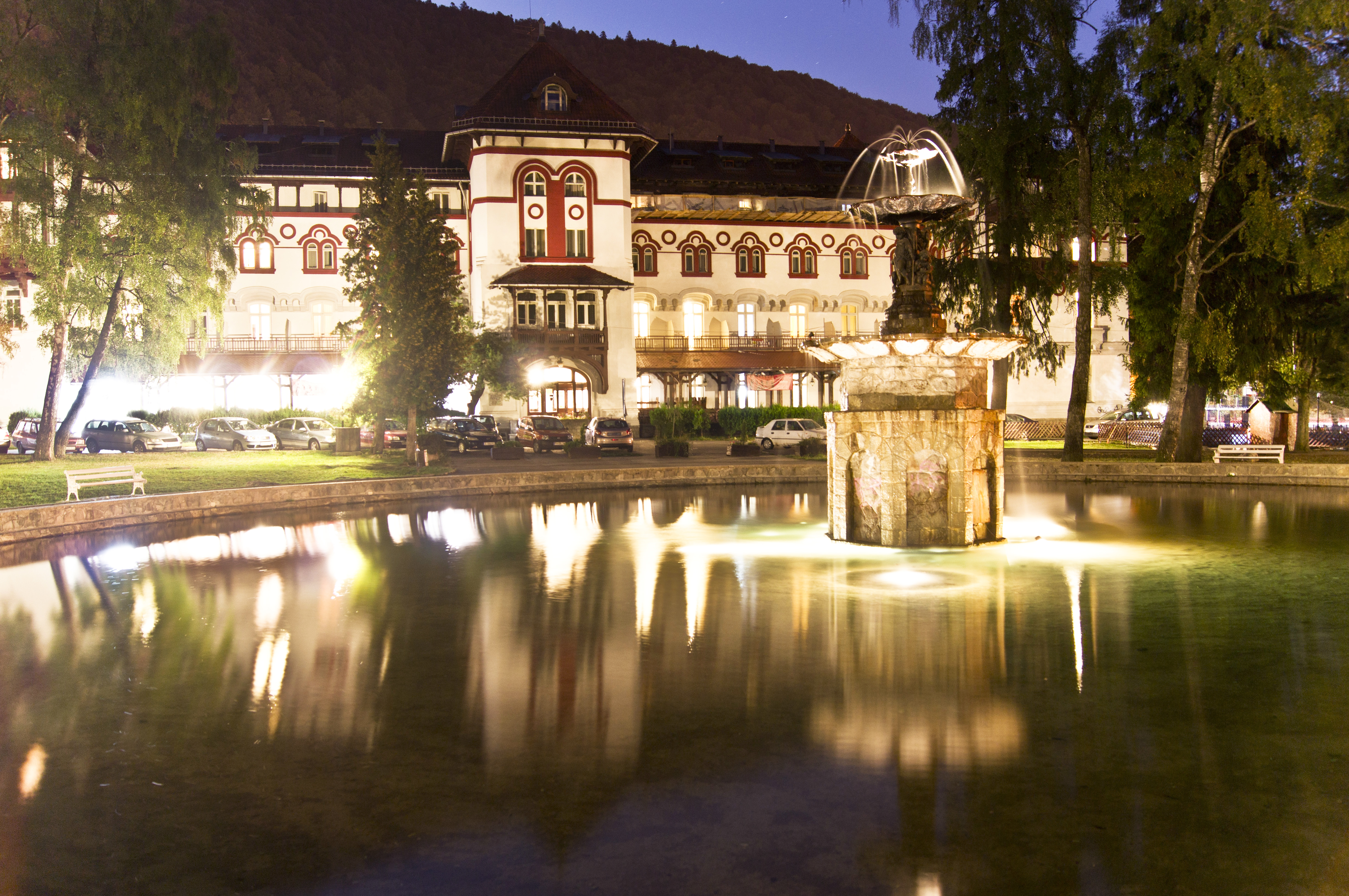 Hotelul Caraiman vazut noaptea din Parcul Dimitrie Ghica.